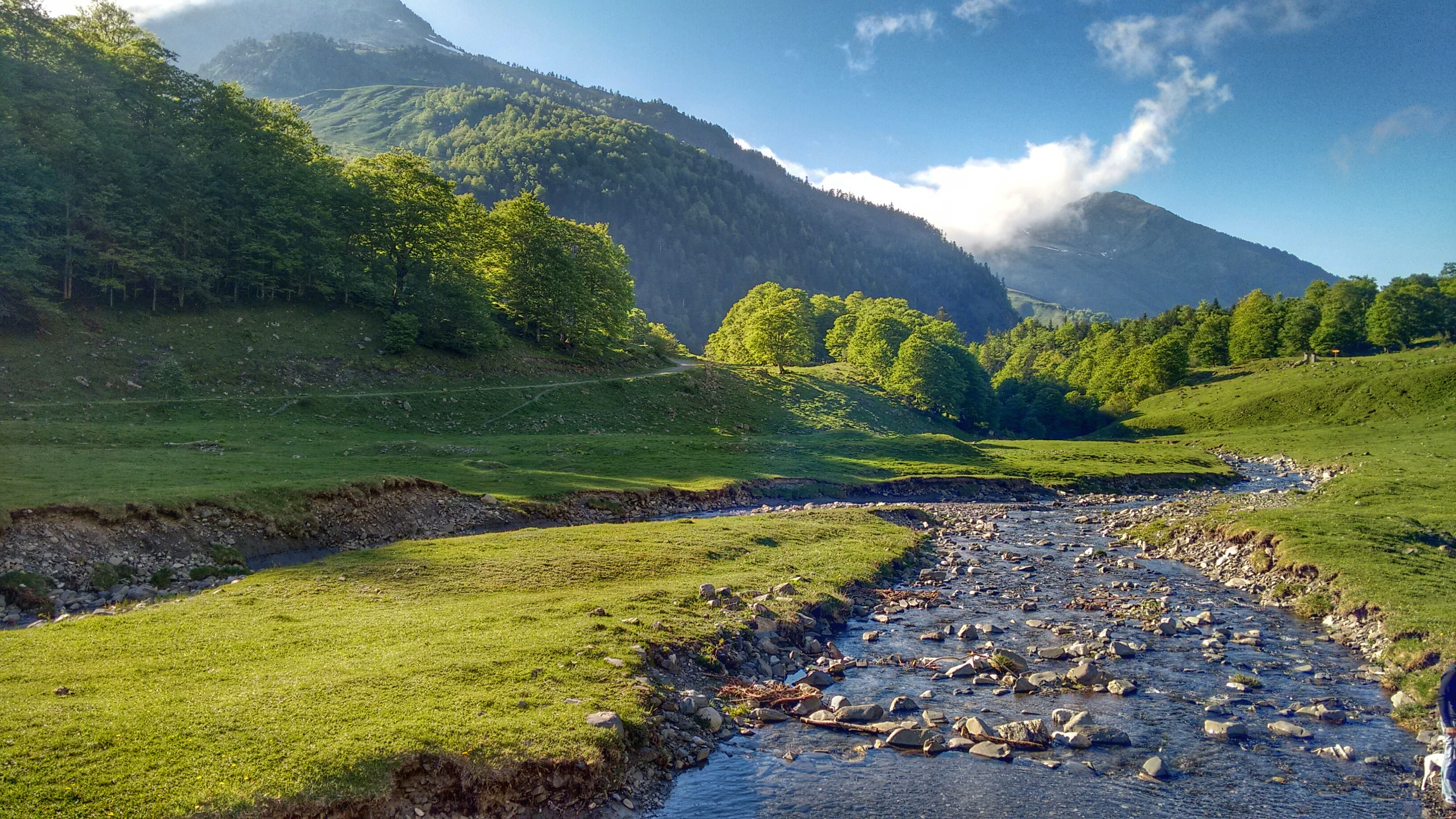 Río Joeu en el Valle de Artiga de Lin This is a photography of a Special Area of Conservation in Spain with the ID: ES5130005. Natura2000 entry, EEA entry